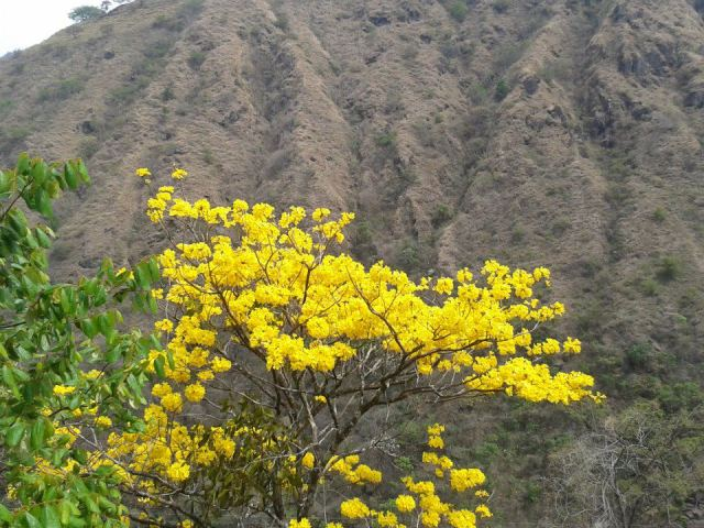 Corteza amarilla (Tabebuia ochracea), conocida en Costa Rica como cortéz amarillo, fotografiada en Cangrejal de Acosta.